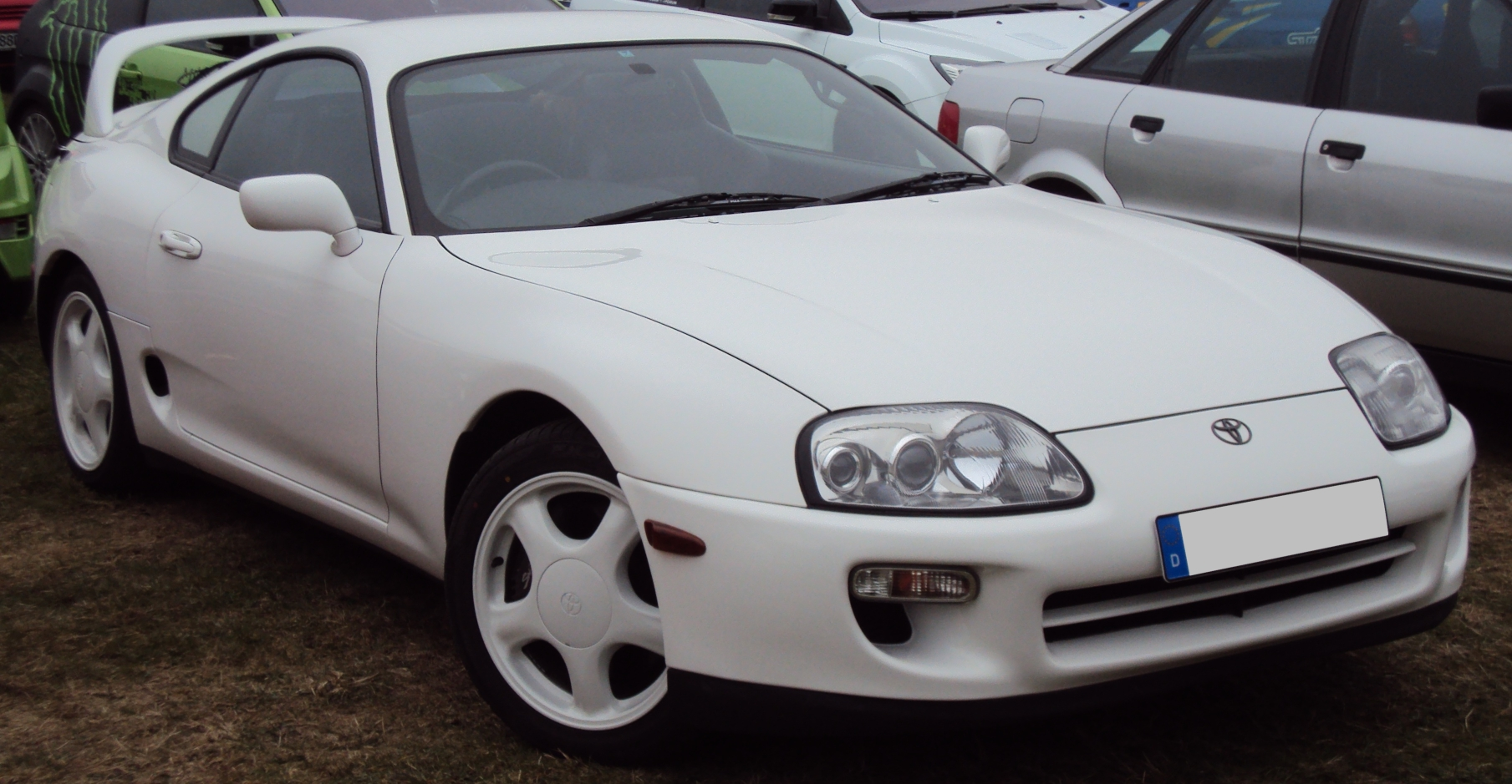 Toyota Supra